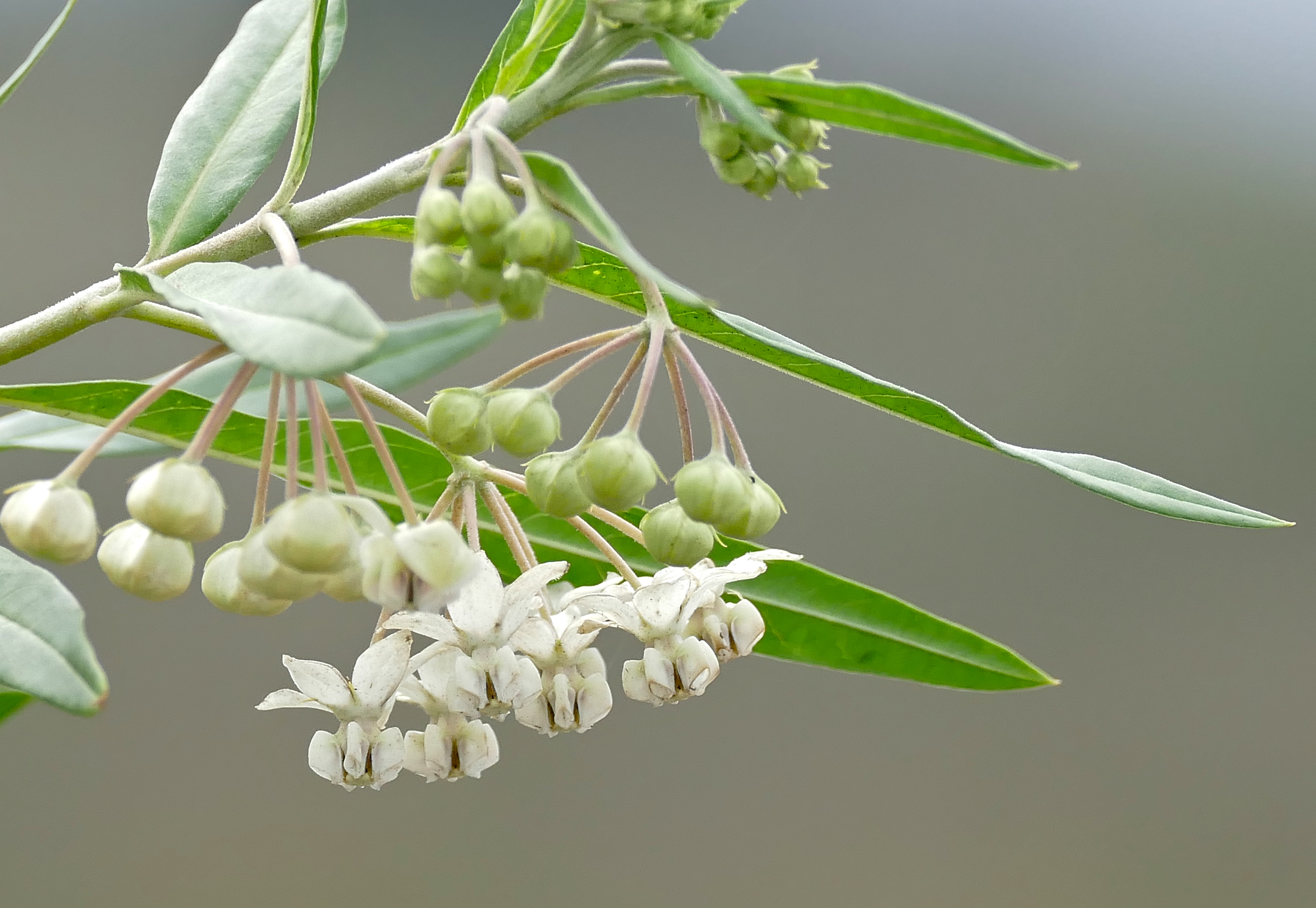 Hluhluwe Game Reserve, Hluhluwe-iMfolozi Park, Kwazulu-Natal, SOUTH AFRICA